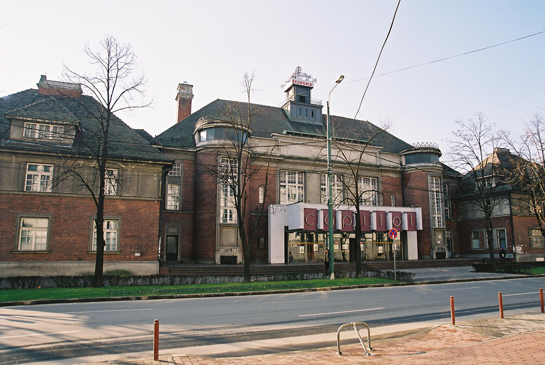 Categorie:Imagini din Timișoara